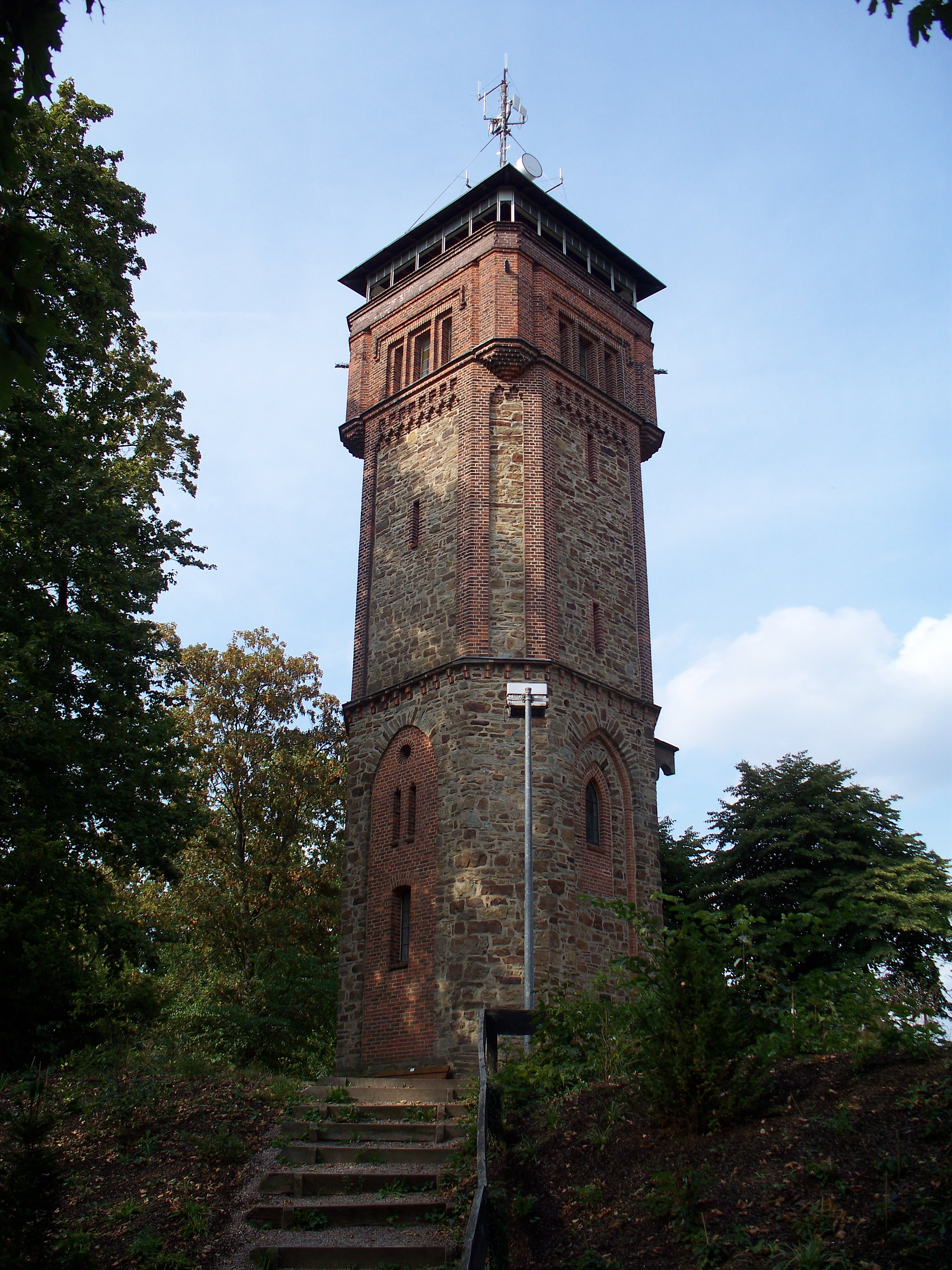 Der Klütturm in Hameln